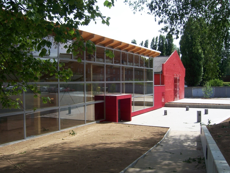 neues Foyer - Theater Wismar